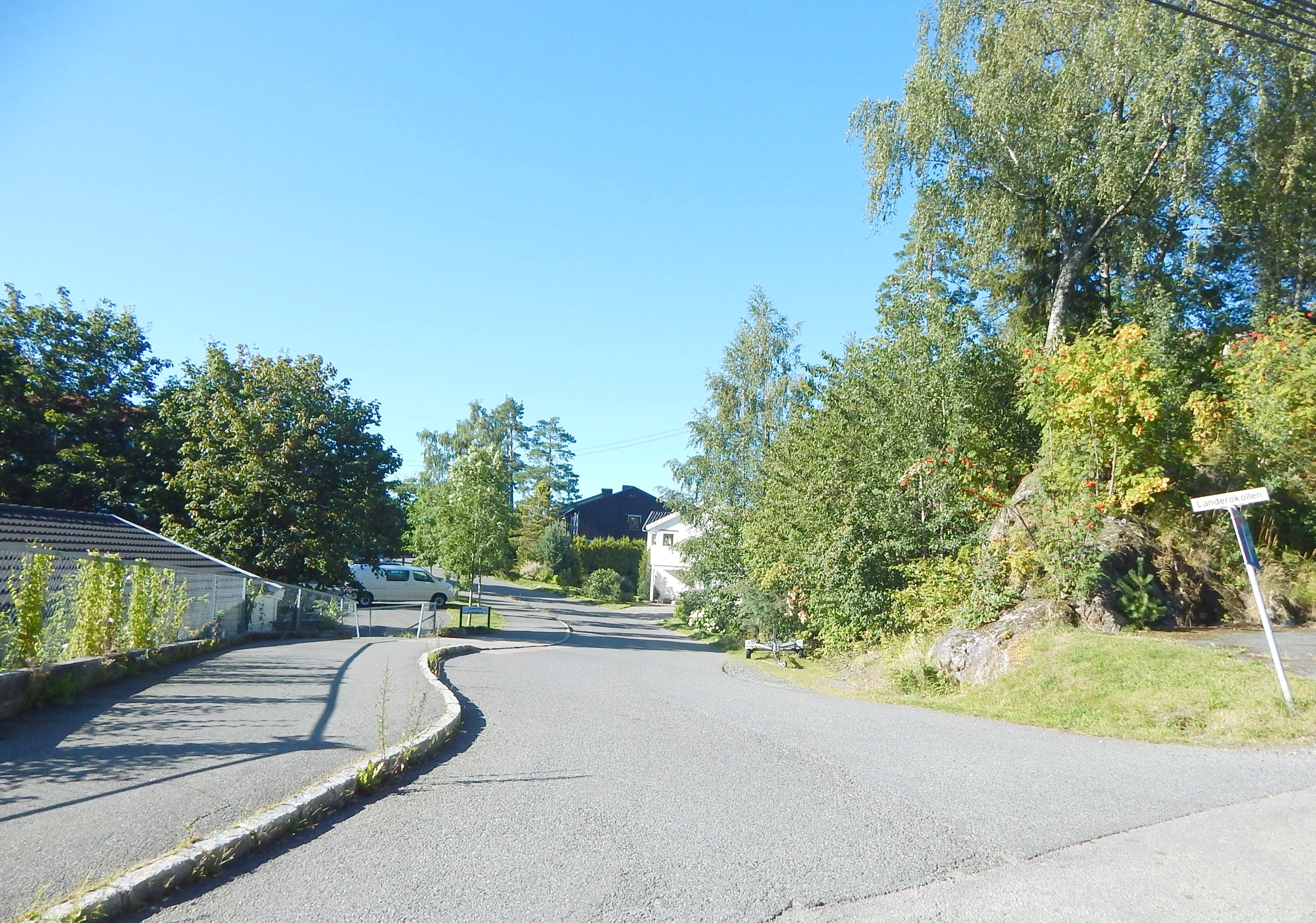 Landerokollen